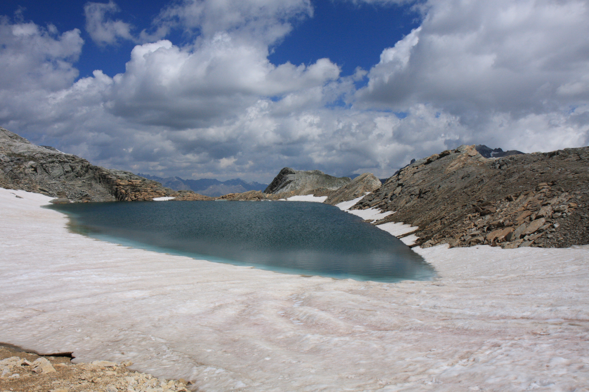 Der Bergsee am Col de Sommeiller am 31. Juli 2008